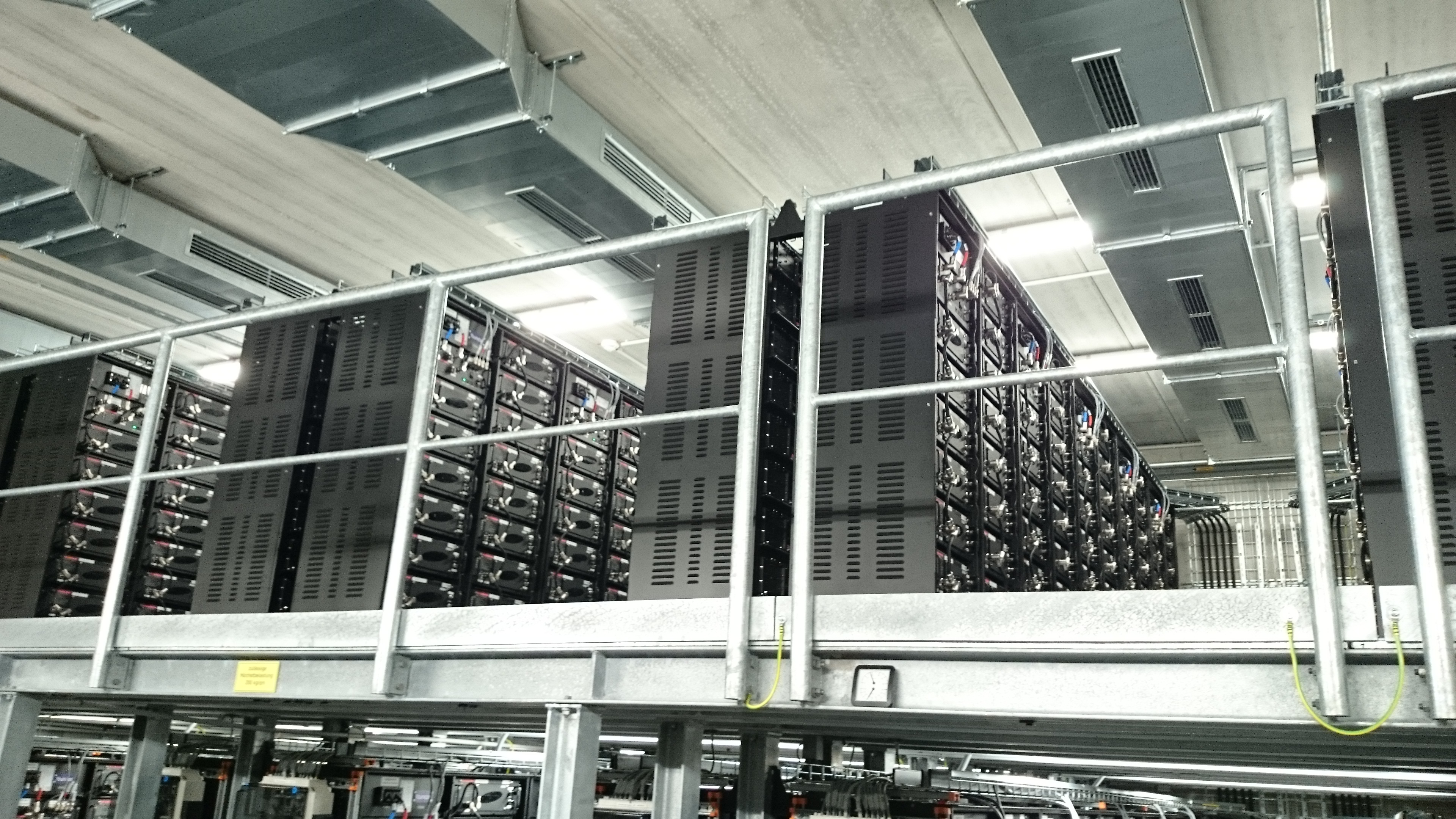 WEMAG Batterie-Speicherkraftwerk Schwerin - Obergeschoss der Halle. Nach Schilderung des Betreibers befinden sich die in modularen Reihen angeordneten Akkus in einem ständigen rechnergesteuerten und bedarfabhängigen Zyklus der Be- und Entladung, der die Akkulaufzeit des Speicherkraftwerks optimieren soll.